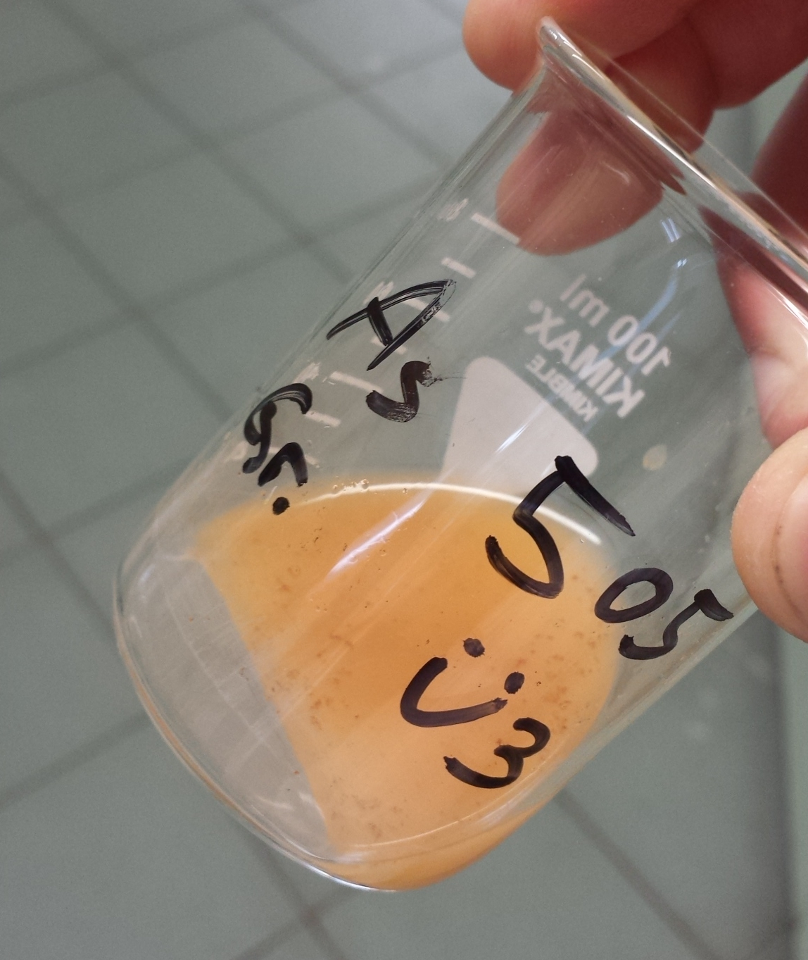 Beim Ansäuern der Arsengruppe fällt orangenes Antimonsulfid aus.